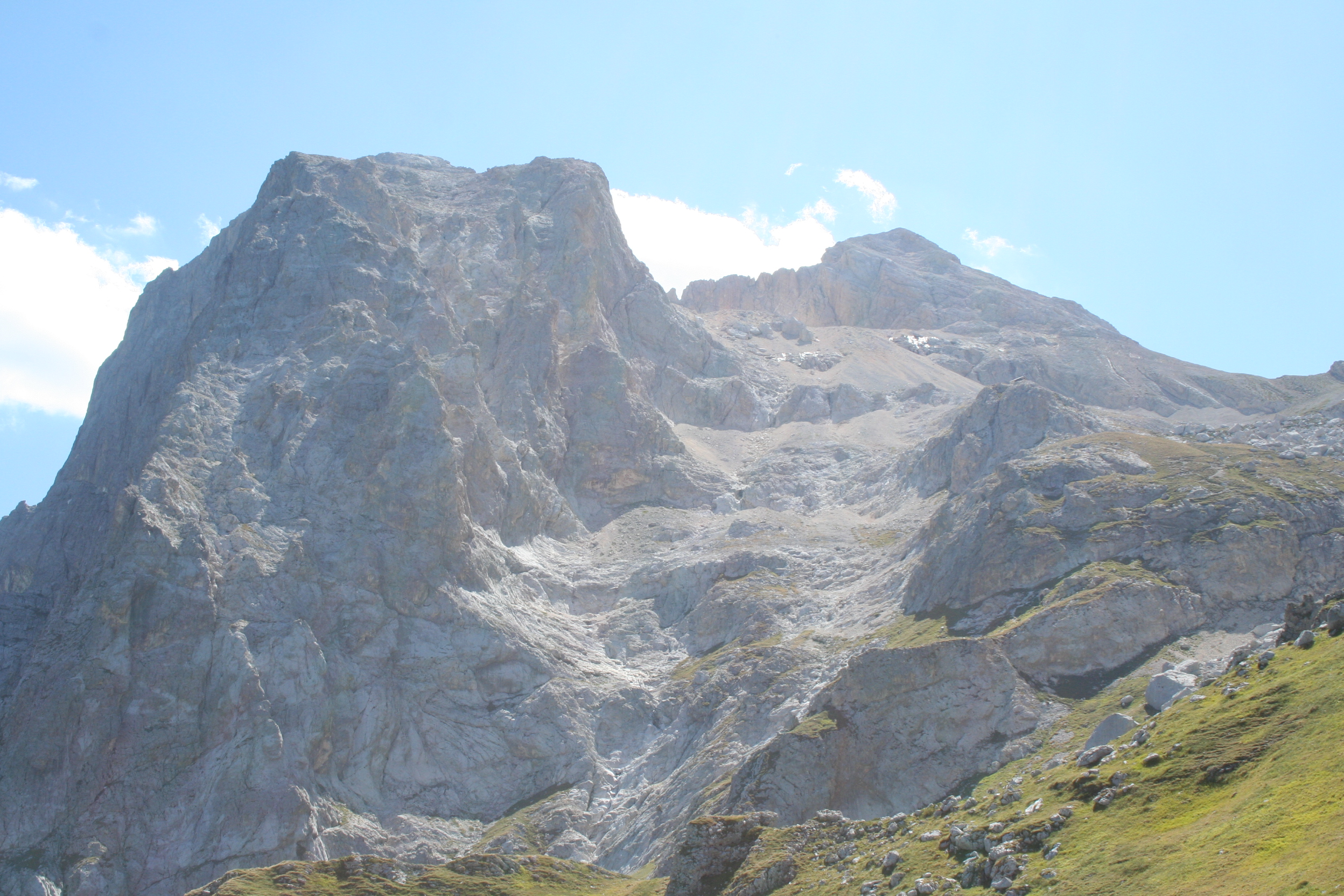 Corno Grande del Gran Sasso d'Italia visto dalla località Arapietra.